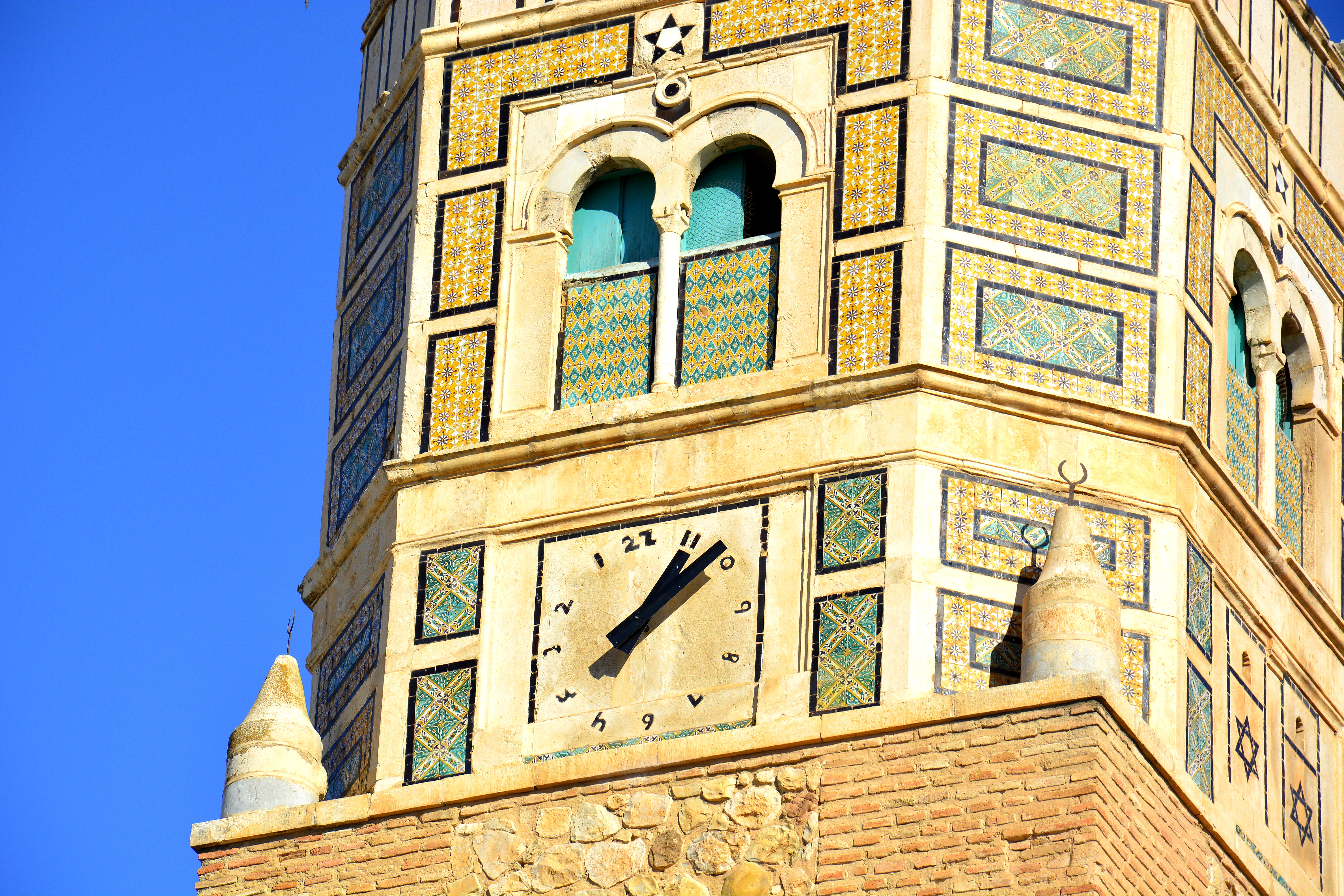 Grande mosquée